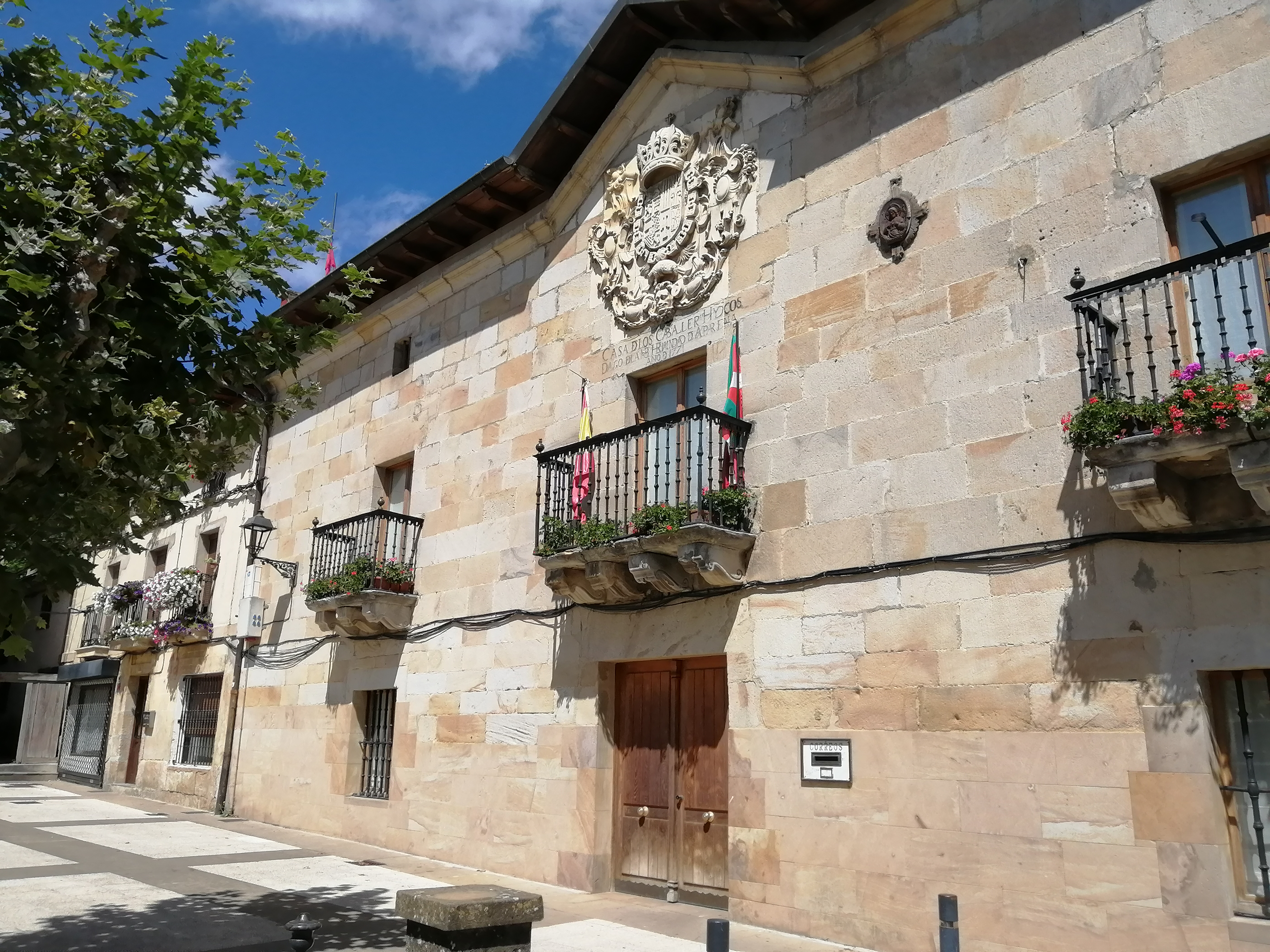 Asparrenako udaletxea, Araian